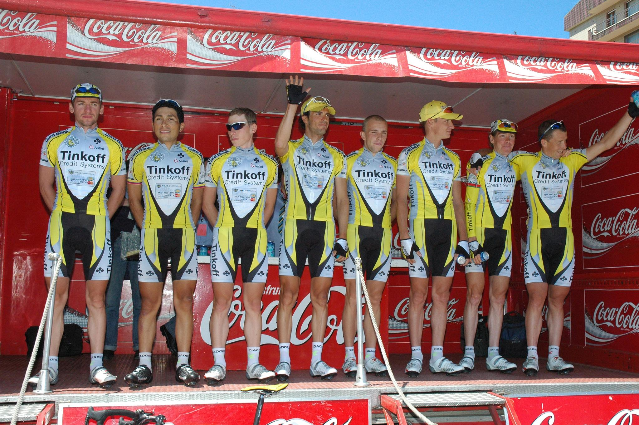 Tinkoff Credit Systems, Euskal Bizikleta 2008